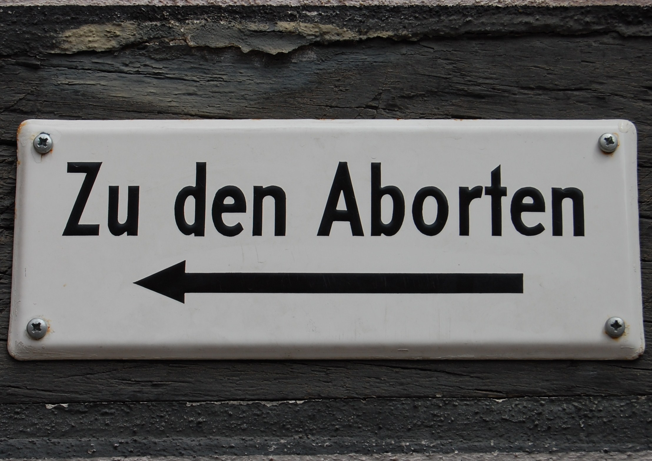 Hinweisschild zur Toilette (Abort)